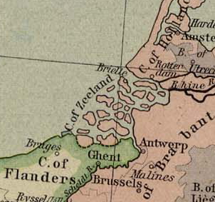 Zeeland 1477